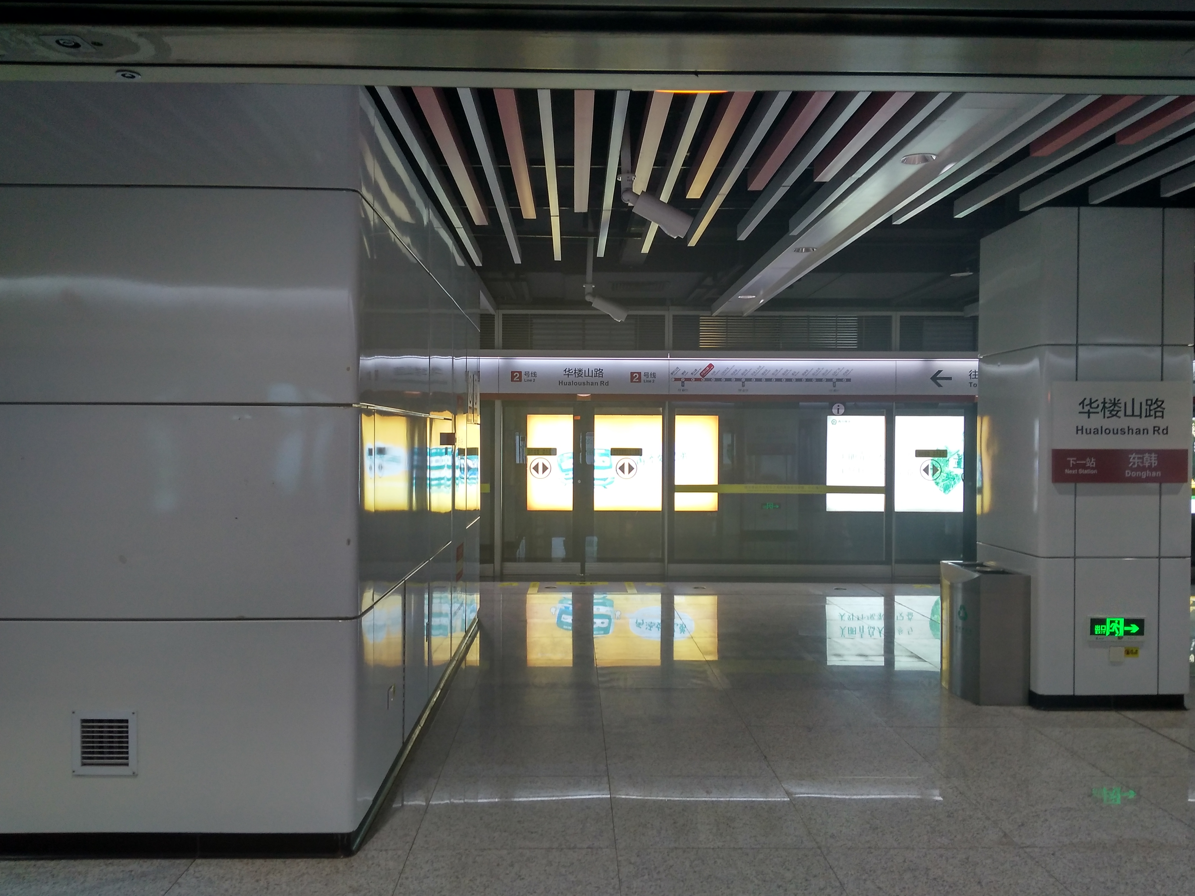 华楼山路站站台